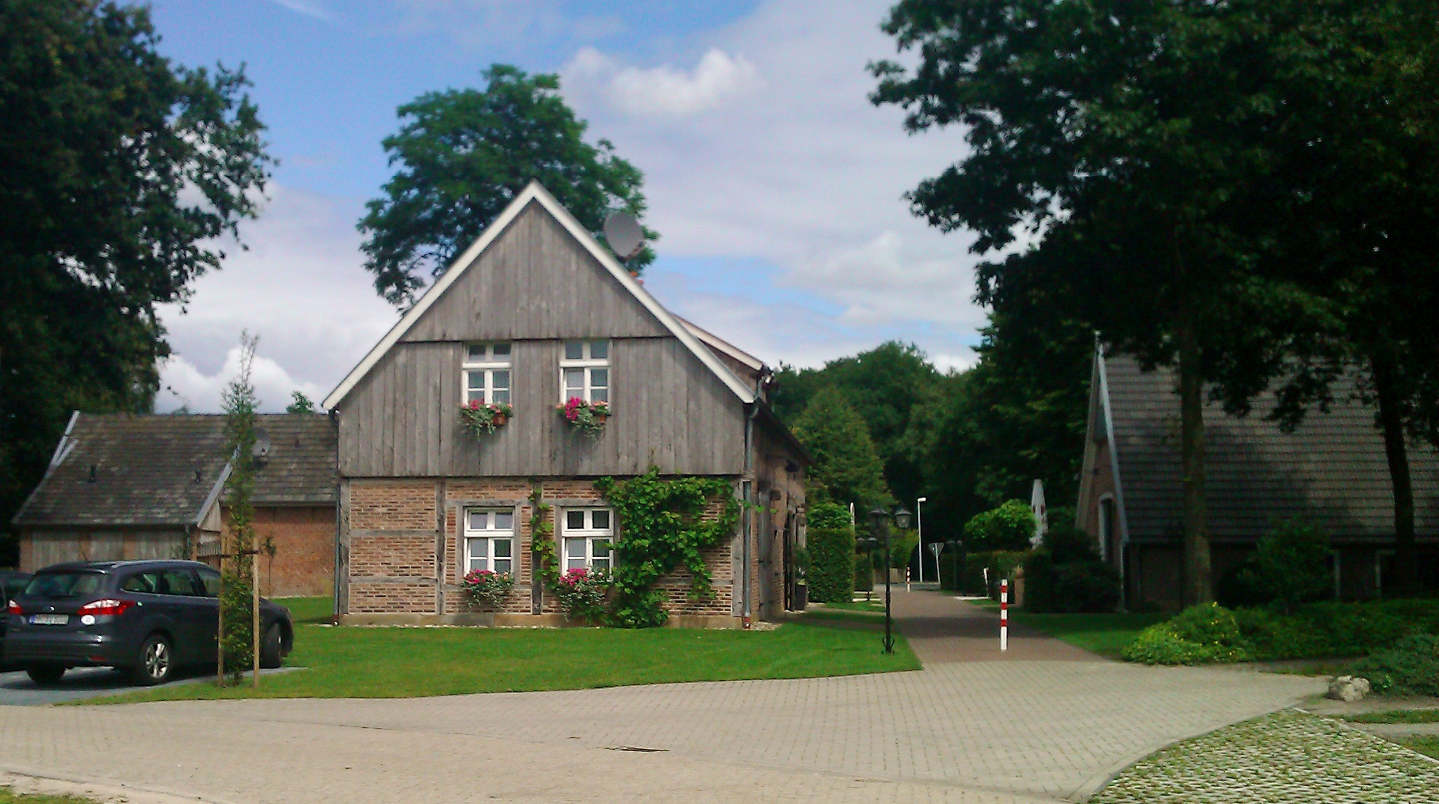 Altes Landhaus Buddenberg, Ringe, Grafschaft Bentheim, Germany